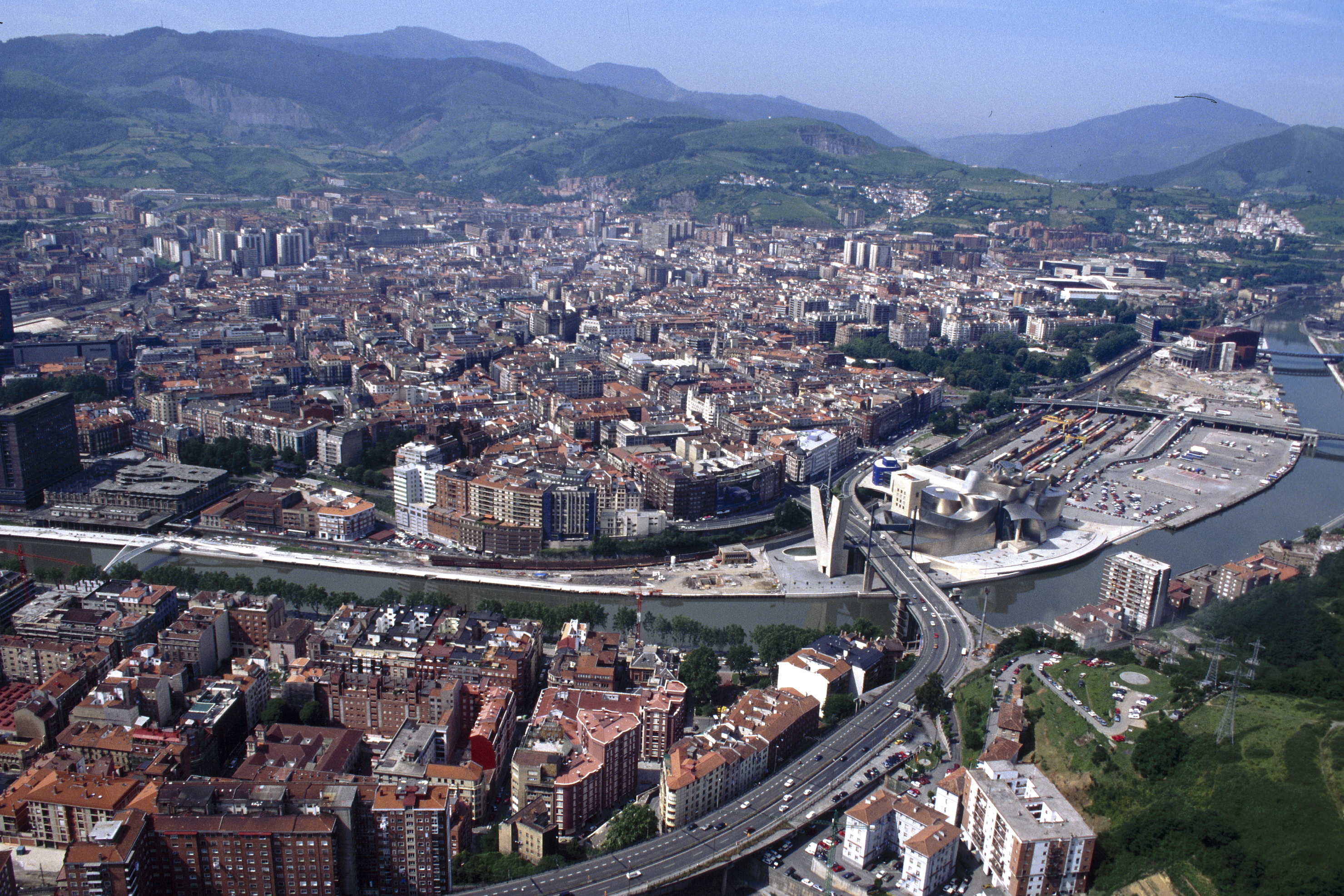 Área de Abandoibarra (Bilbao) en 1998Euskara: Abandoibarra gunea 1998an